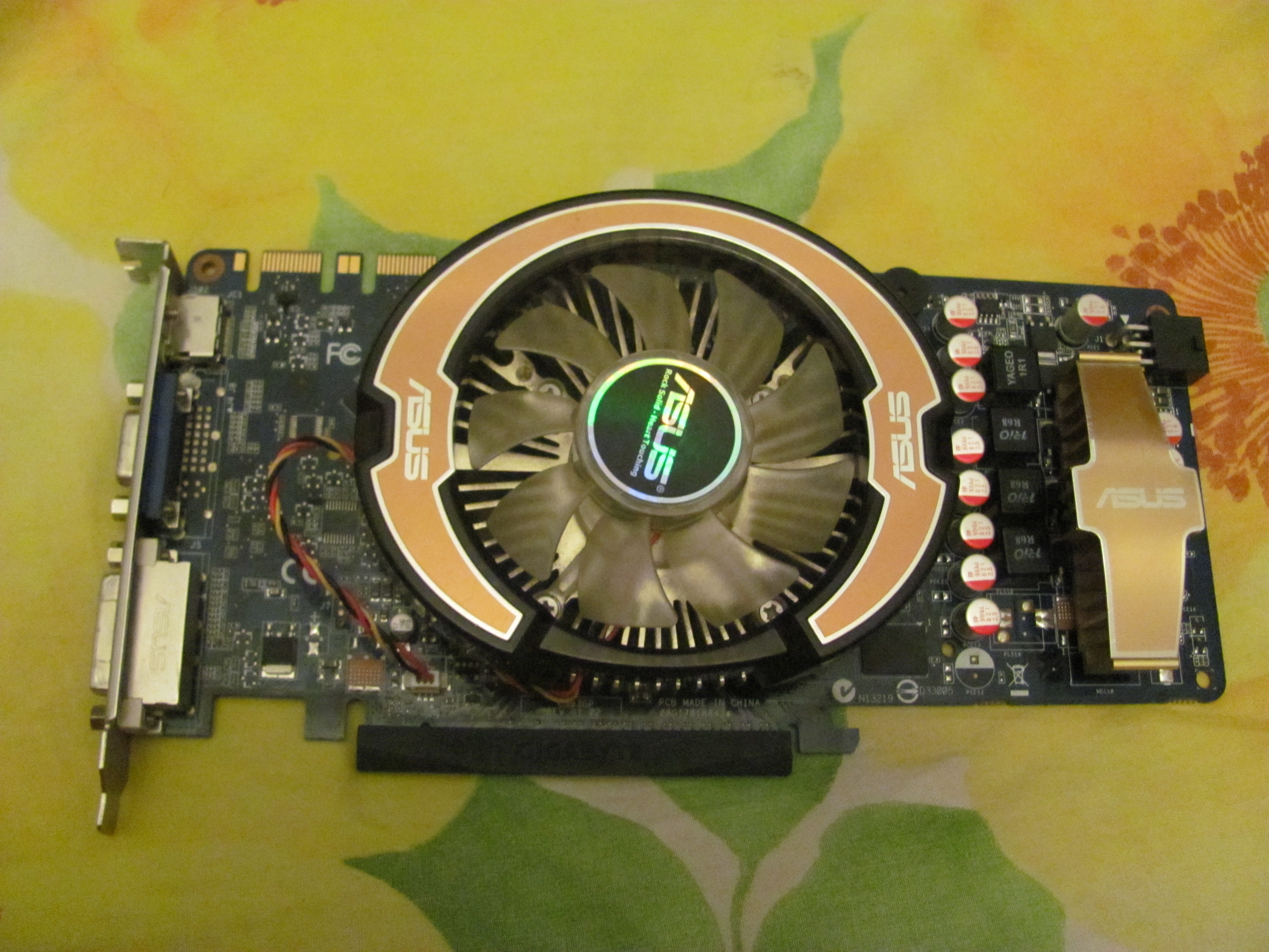 NVIDIA GeForce 9800 GT 1GB, одна из лучших видеокарт своего времени.